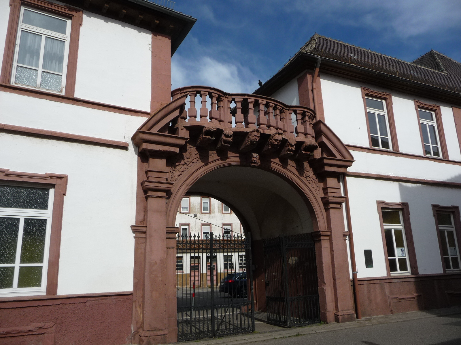 Grünstadt